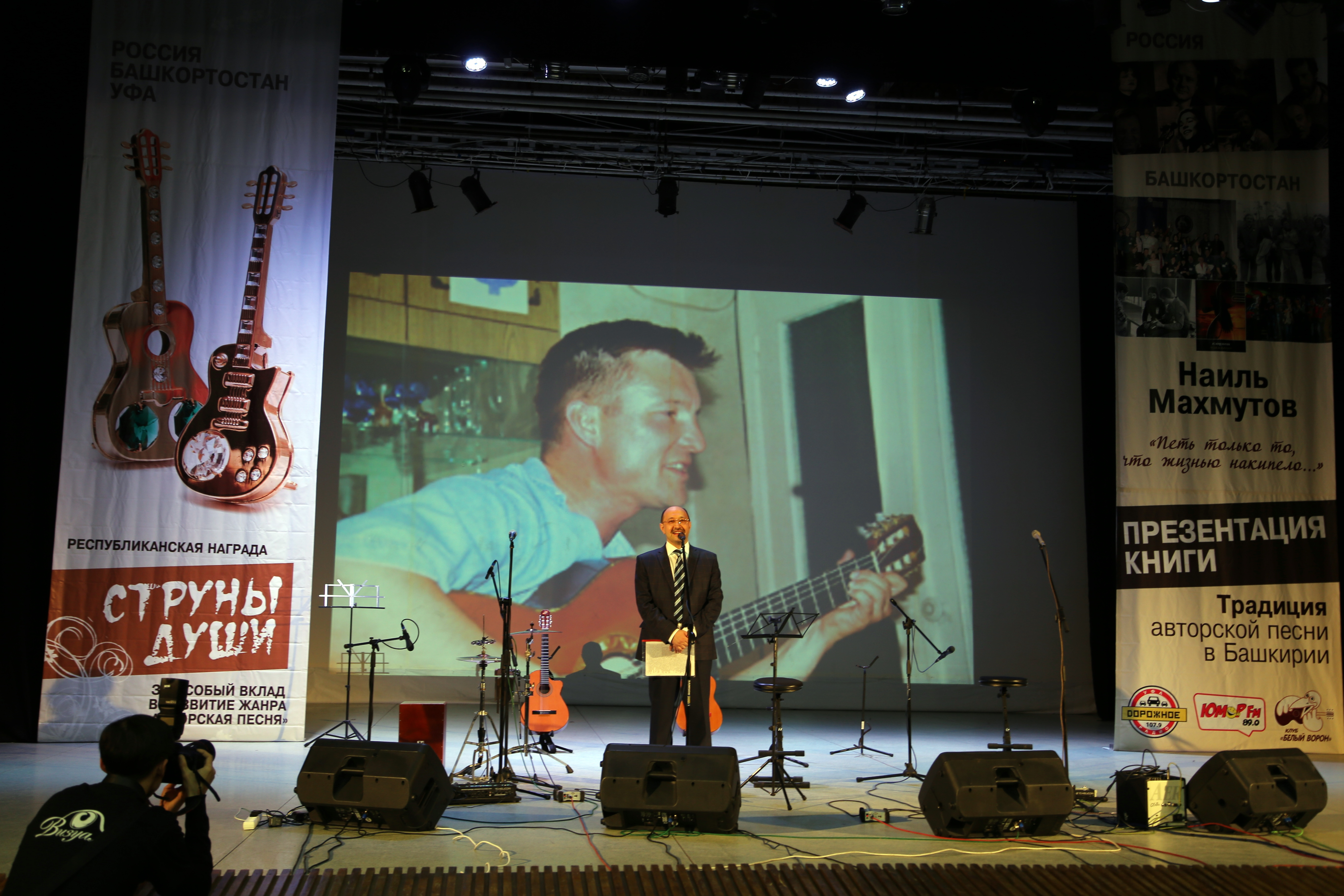 Презентация книги "Петь только то, что жизнью накипело..." На сцене издатель Наиль Махмутов. Из архива "Башинформ".